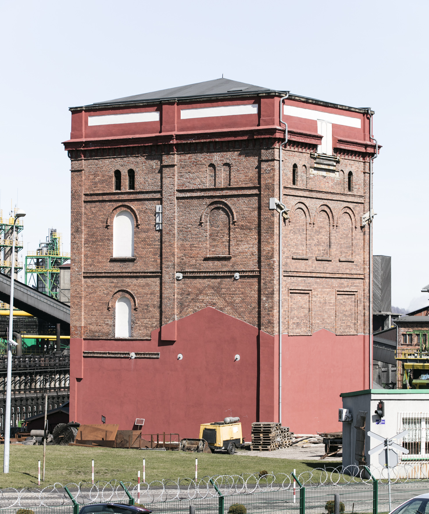 Niederschlesien Bergwerk Victoria Schacht von Wrangel